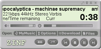 Zinf 2.2.5 under Linux